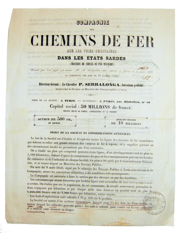 Volantino pubblicitario della Compagnie des chemins de fer sur les voies ordinaires dans les Etats Sardes, costituita a Torino il 10 luglio 1856 con succursale a Parigi, 1859 (AS Roma, Ministero del commercio, belle arti, industria, agricoltura e lavori pubblici, b. 455, fasc. 2)